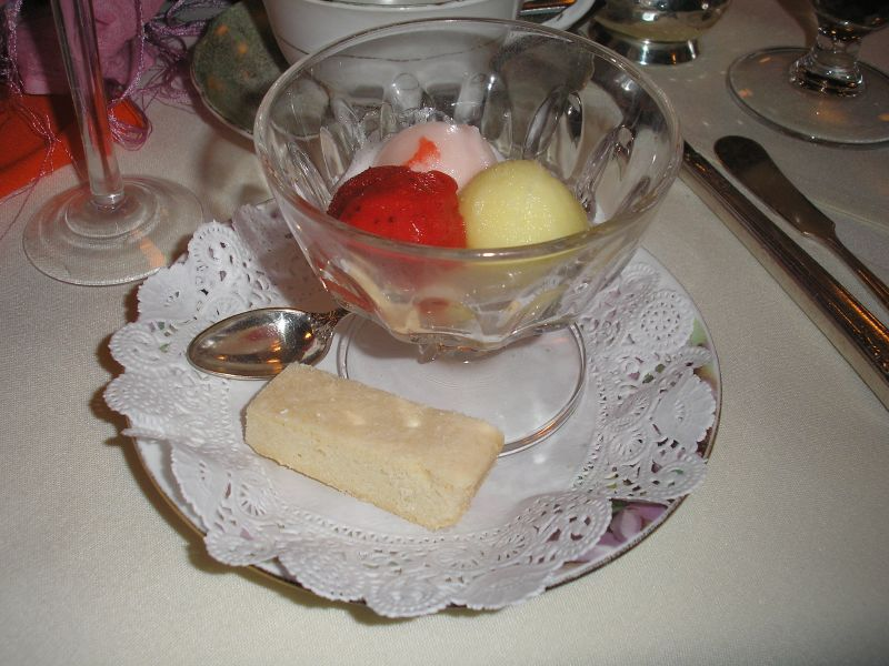 Sorbets aux trois parfums